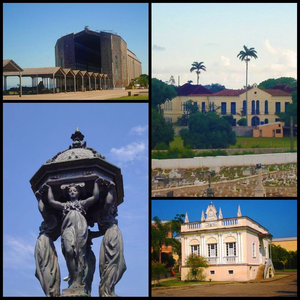 Montagem de fotos do bairro de Santa Cruz, Rio de Janeiro, RJ, Brasil